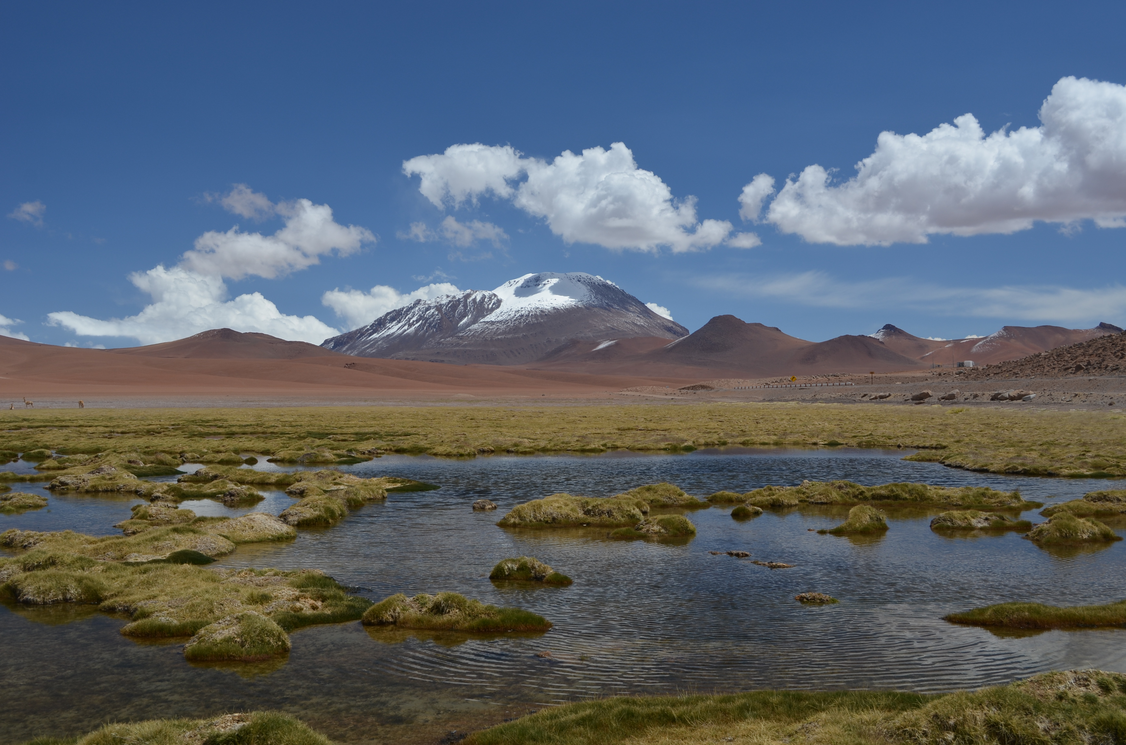 Cordilheira dos Andes